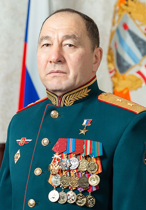 Жидко Геннадий Валериевич